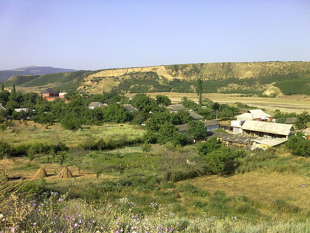 Село Зори-Отар